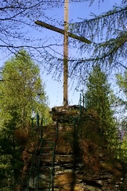 Friedenskreuz auf einem der beiden Gipfel des Maimont, Pfälzerwald.